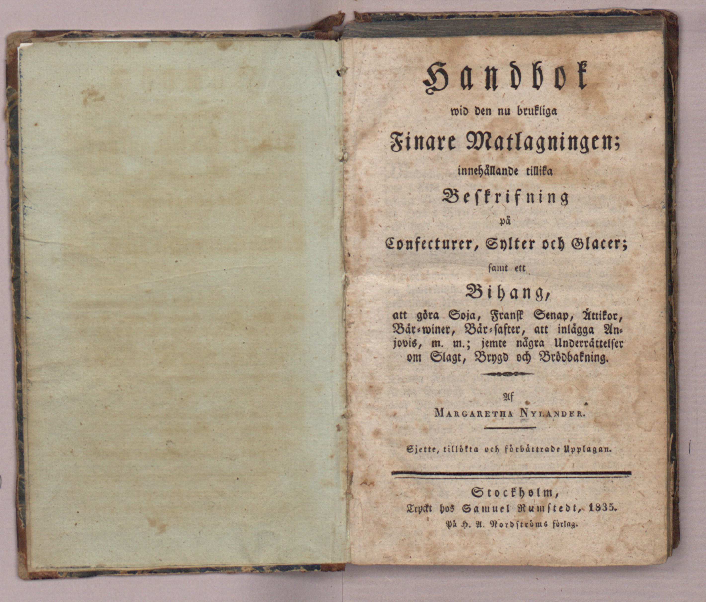 Sida 2